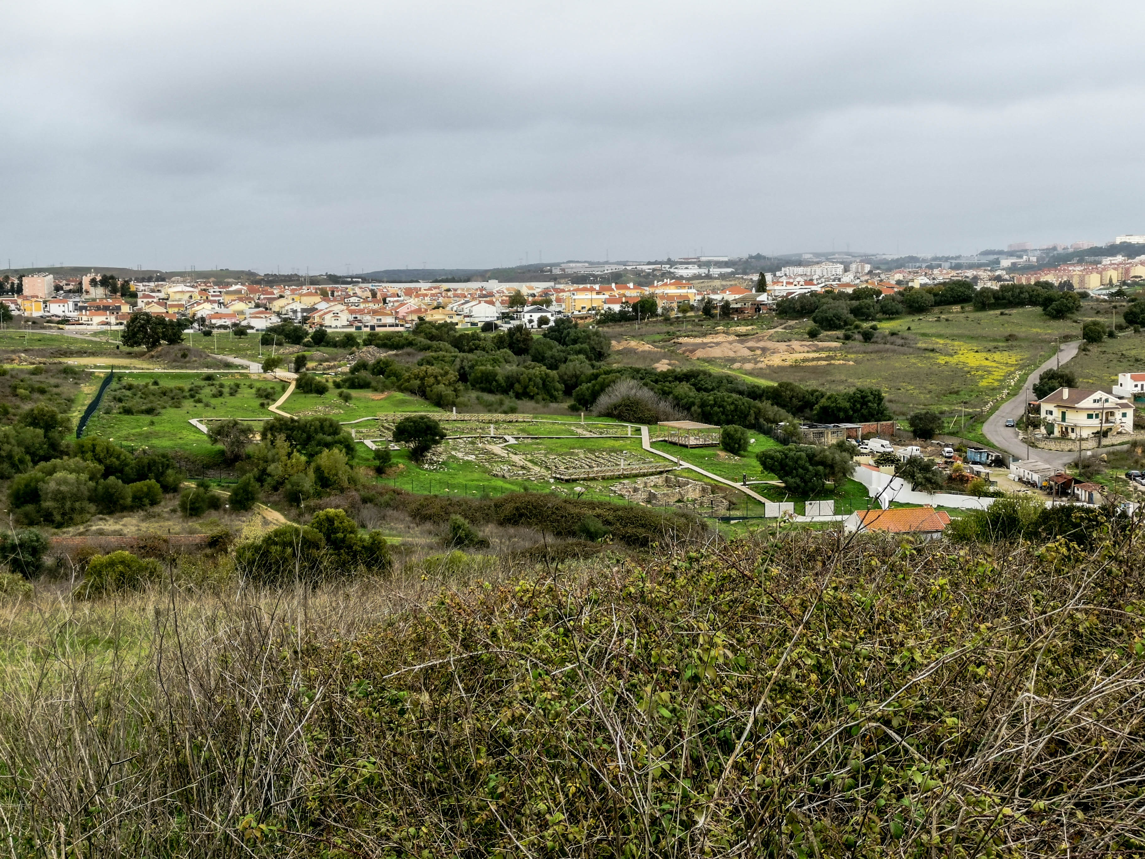 Vista da Villa Romana de Freiria de Outeiro de Polima.